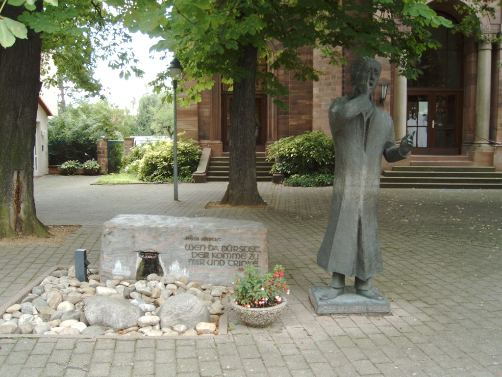 Skulptur "Der Rufer" vor Dreifaltigkeitskirche in Mannheim